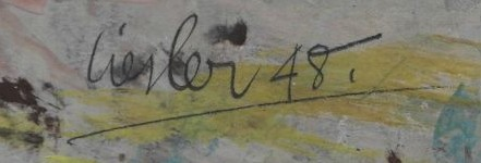 Josef Liesler signatura